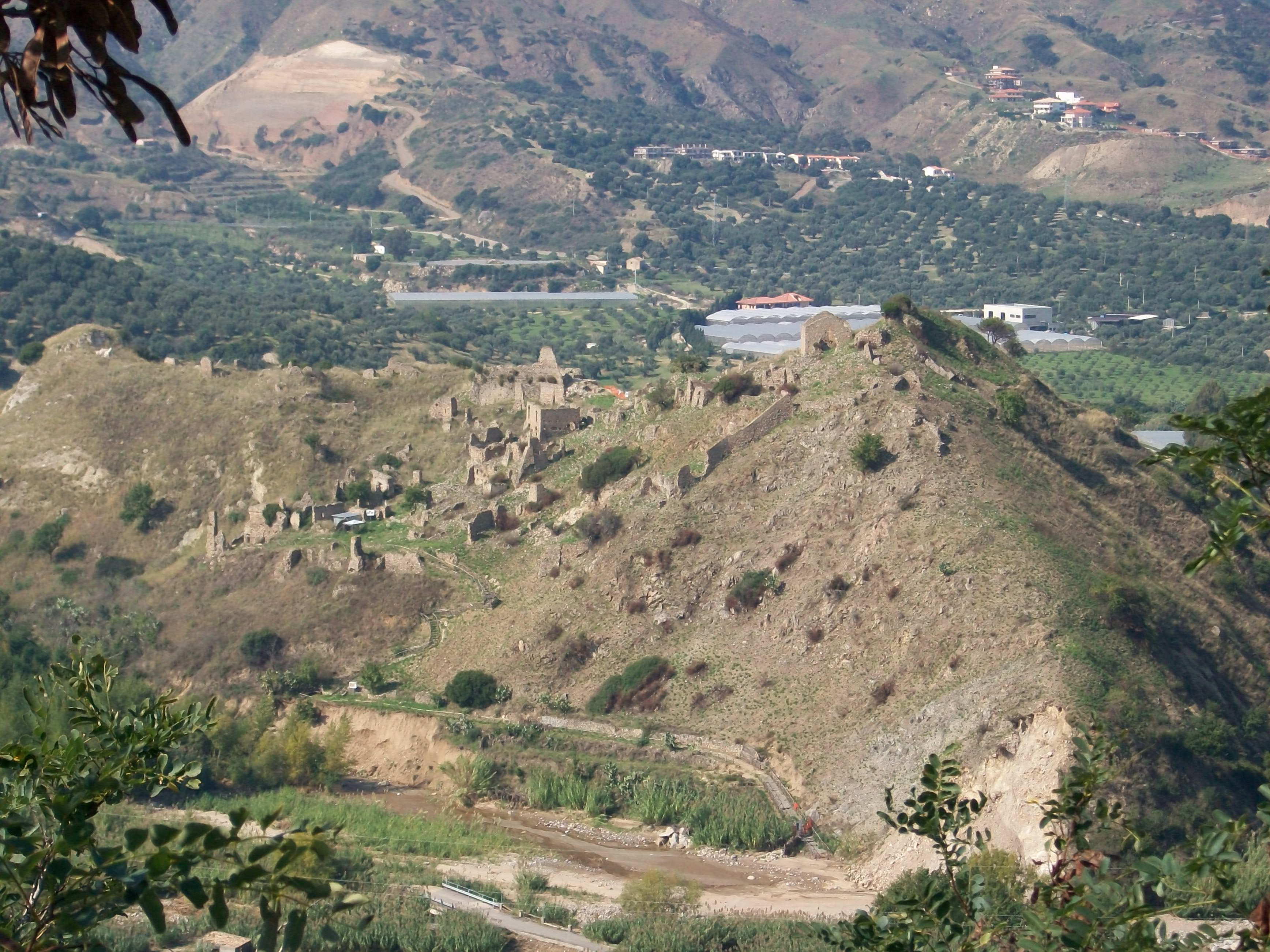 Vista dell'area archeologica di Soverato vecchia da Soverato superiore, licenza libera, foto scattata da Francesco Antonio Tropea.